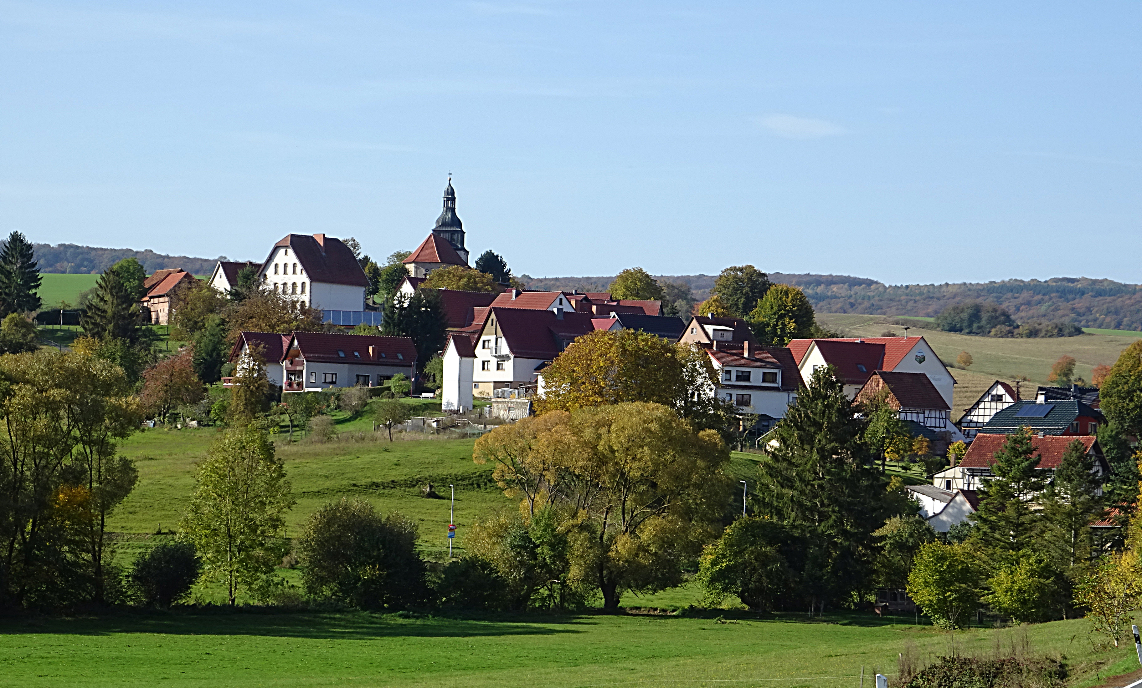 Blick auf Wiesenfeld (Eichsfeld) von Nordosten